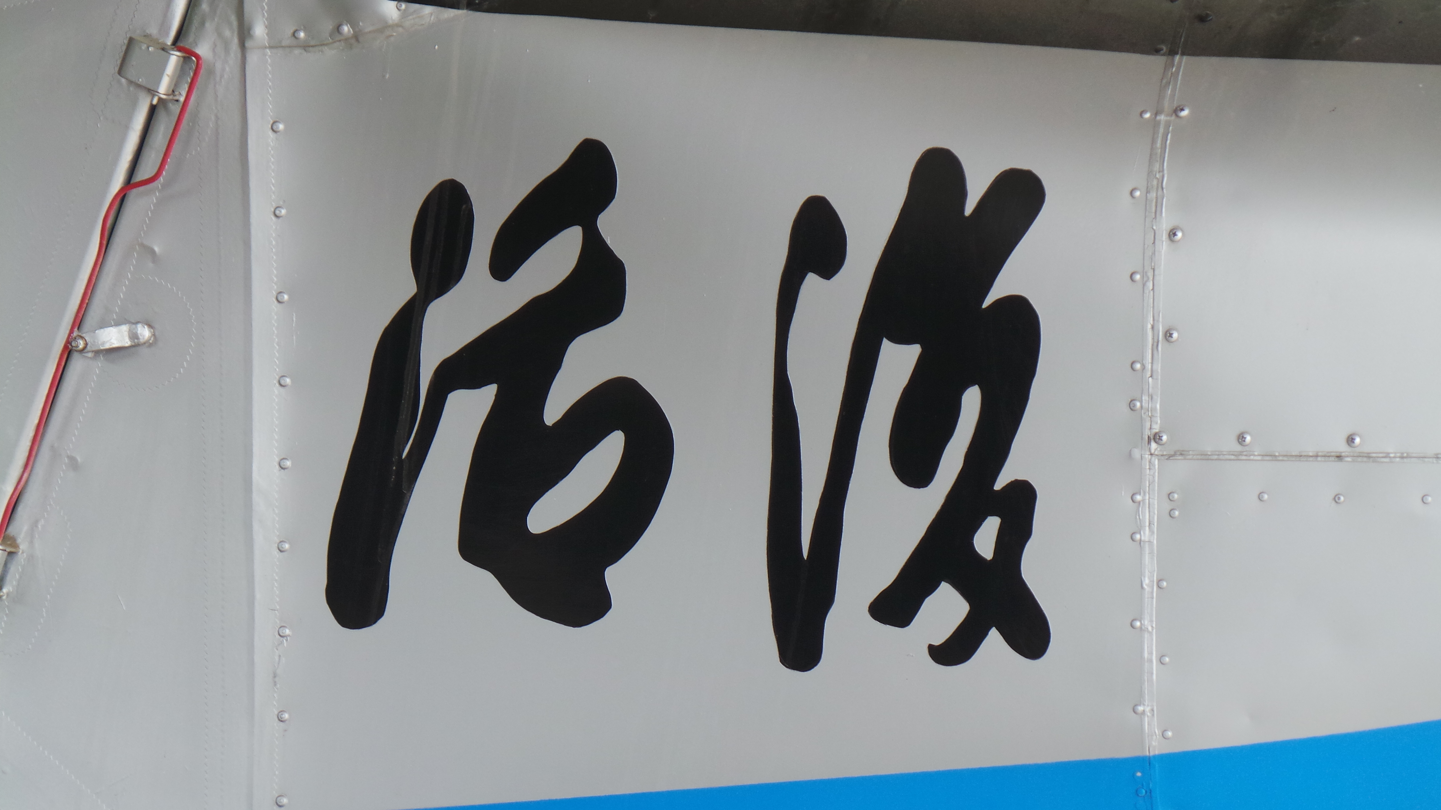 공군사관학교 박물관에 전시중인 부활호 복원기에 적힌 부활(復活) 글씨. 원본은 이승만 대통령의 친필휘호이며 복원기에 적힌 것은 디지털 작업으로 복원한 것이다.